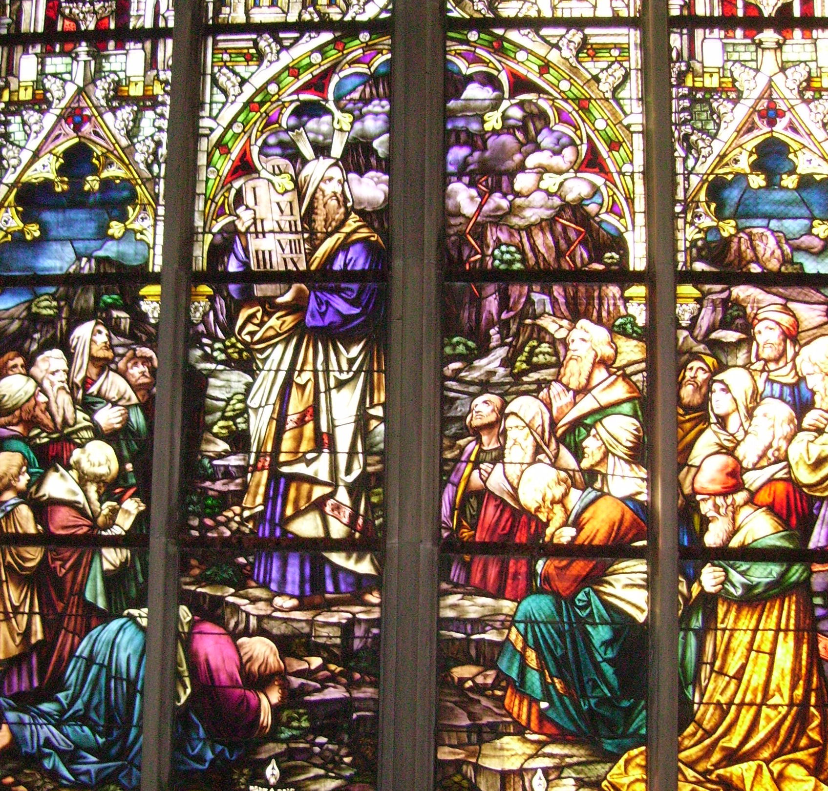 Gedächtniskirche (Memorial Church) in Speyer, Germany